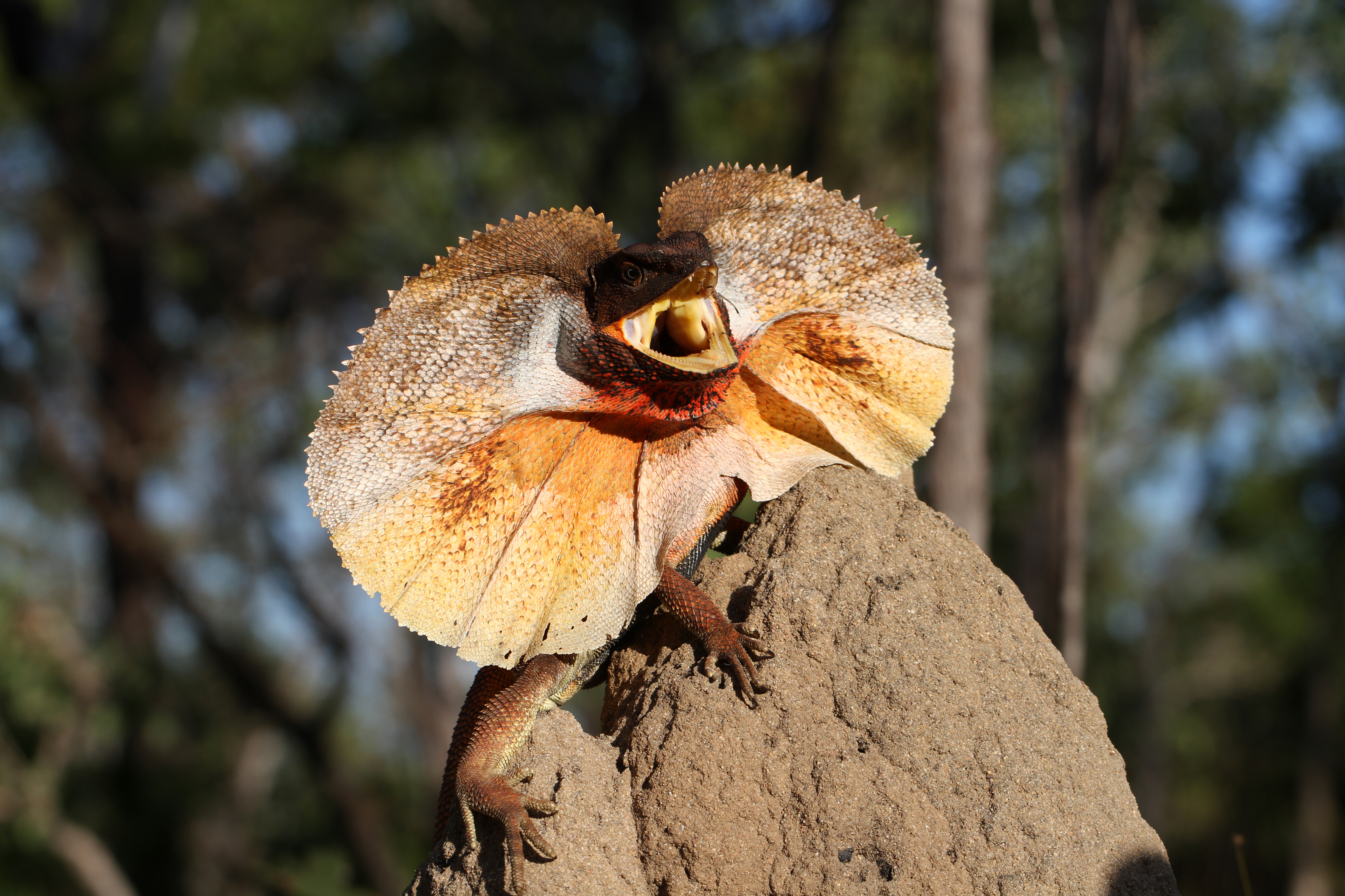 Kakadu NT